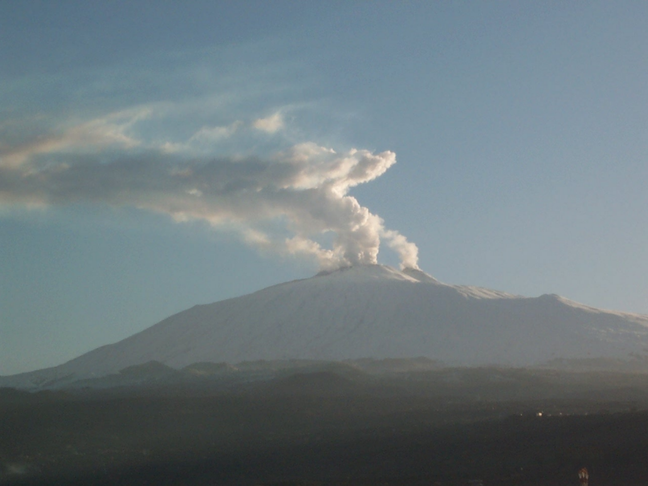 Etna, tre pennacchi; versione senza data digitale. File originale caricato da giomodica.